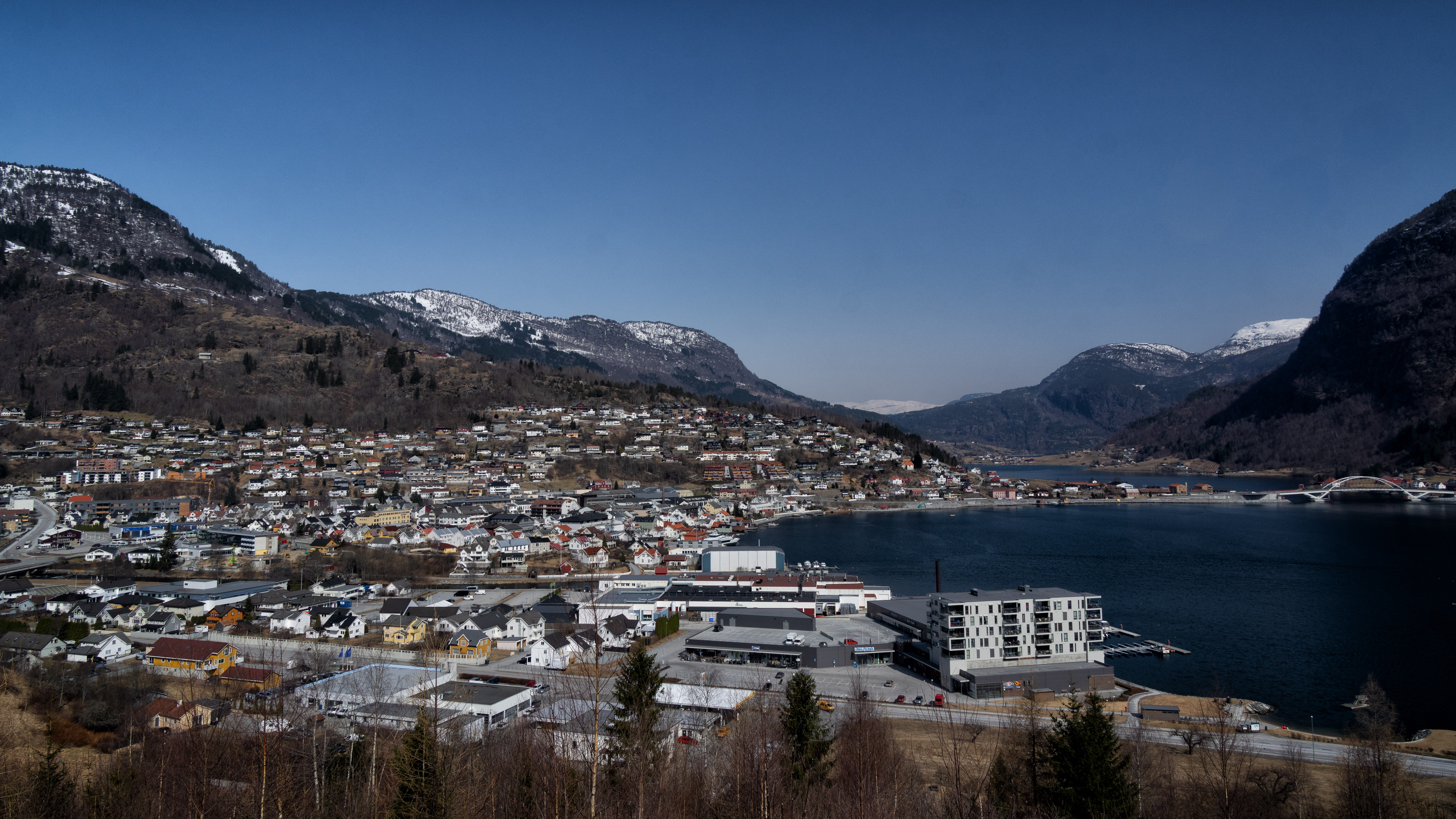 Sogndalsfjøra og Barsnes.